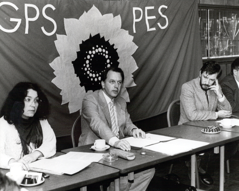 In der Bildmitte: Peter Schmid (*1940), Schweizer Politiker (Präsident der Grünen Partei der Schweiz GPS}, rechts: Laurent Rebeaud, Schweizer Politiker